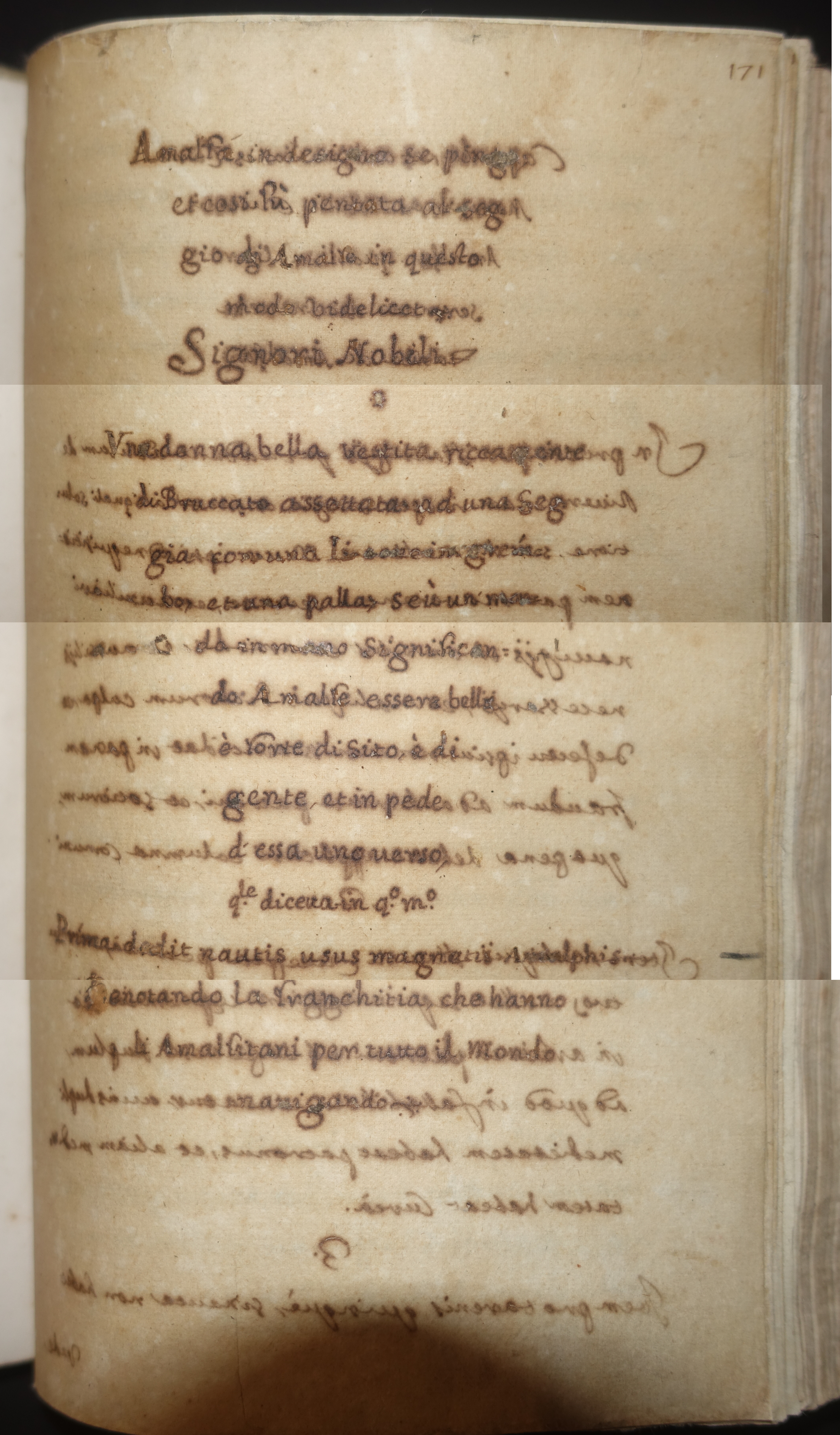 Blad van 16e eeuwse kopie van de Tabula Amalphitana in het Museo della Bussola in Amalfi